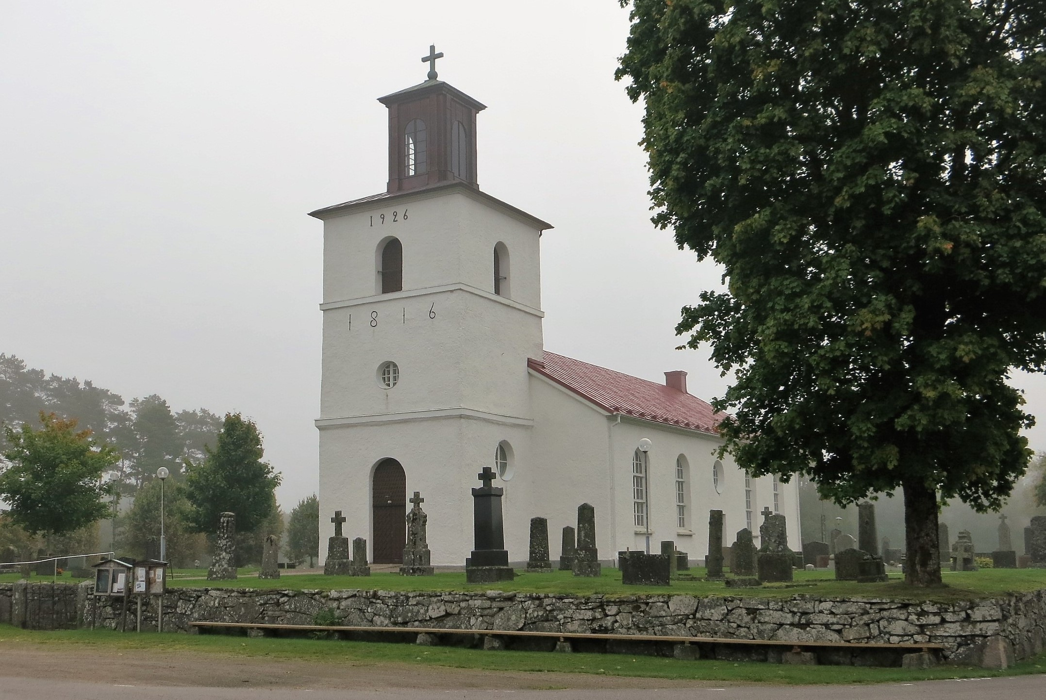 Krogsereds kyrka